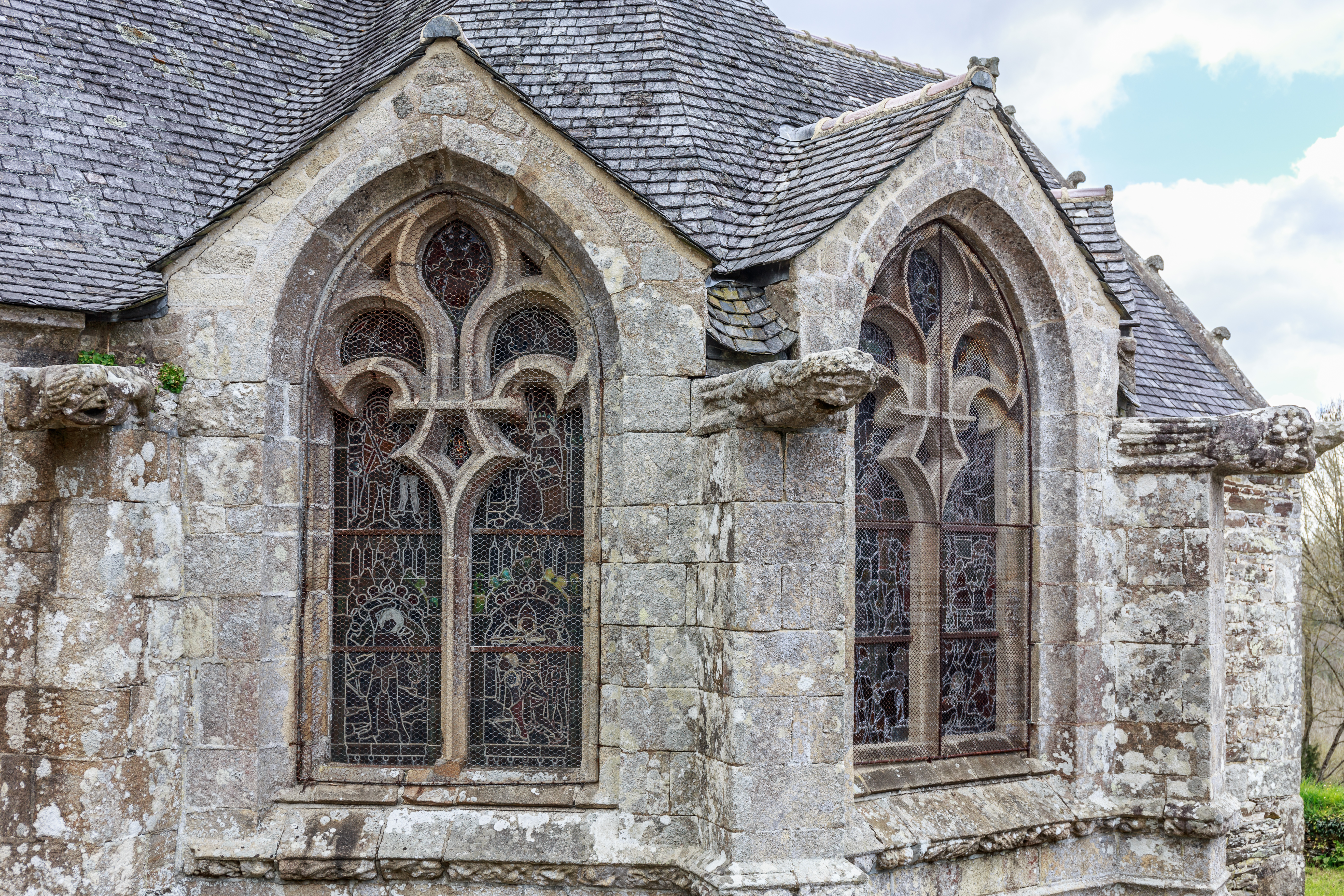 L'église Saint-Envel à Loc Envel, Côtes d'Armor.